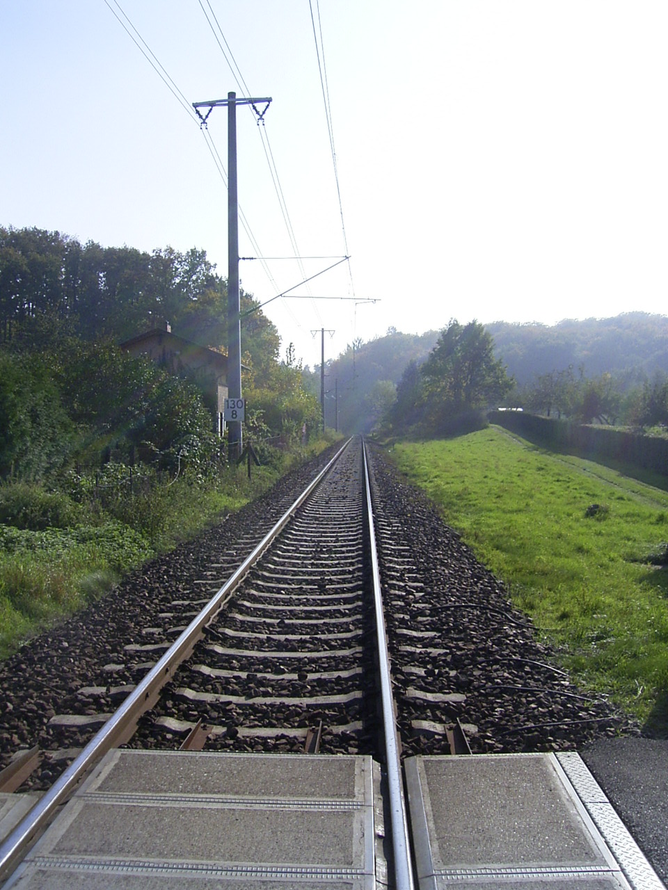 Bahnstrecke Neubrandenburg - Neustrelitz am Bahnübergang Hintersten Mühle mit Blickrichtung Neustrelitz. Die Strecke gehört zur Berliner Nordbahn.